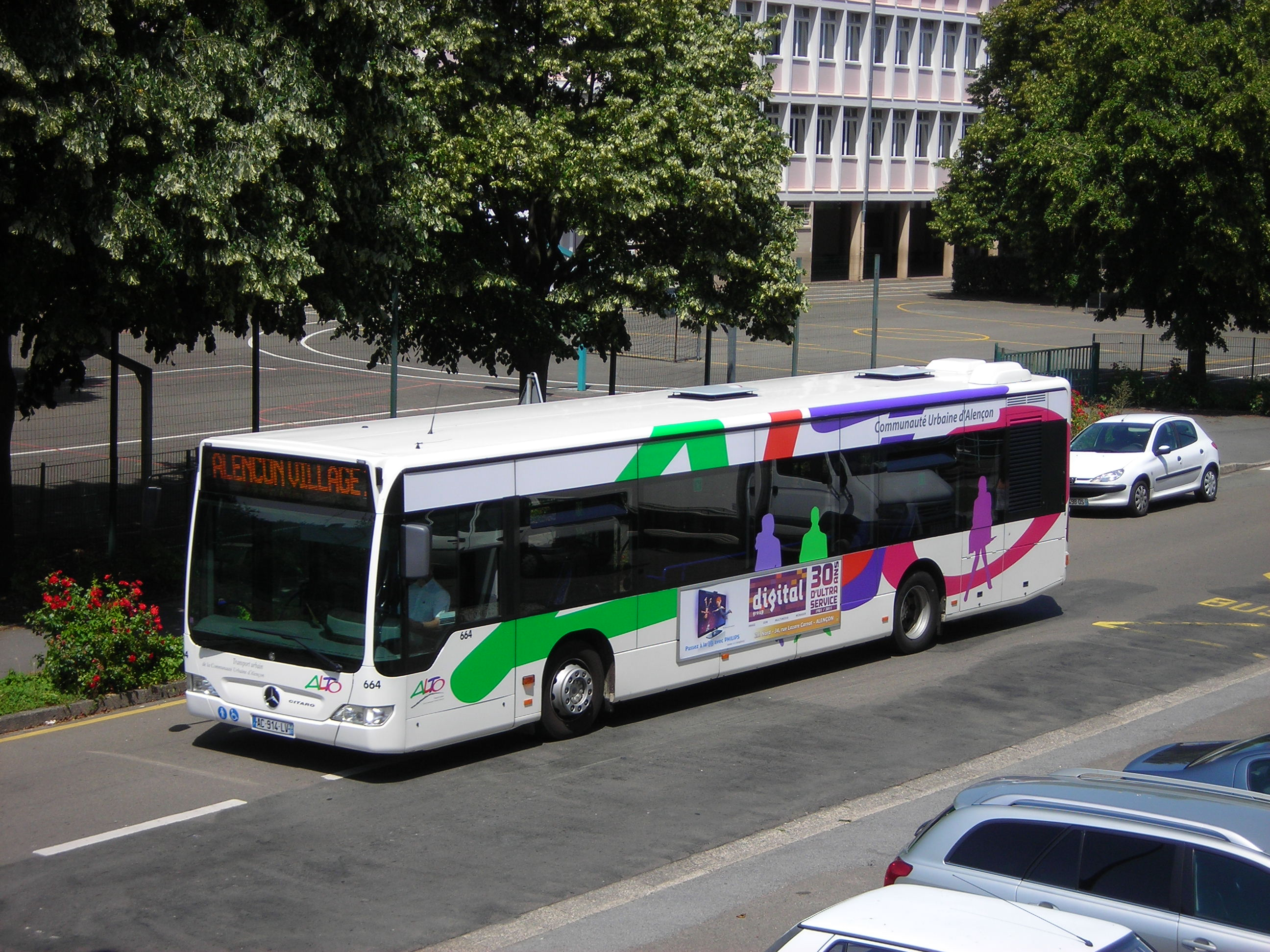 Autobus Mercedes Citaro sur la lingne 1 du reseau Alto de la ville Alençon (Orne,France)